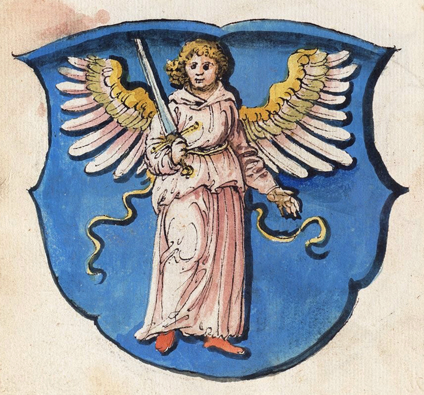 Беларуская (тарашкевіца): Зямельны герб Наваградчыны (Navahradak)